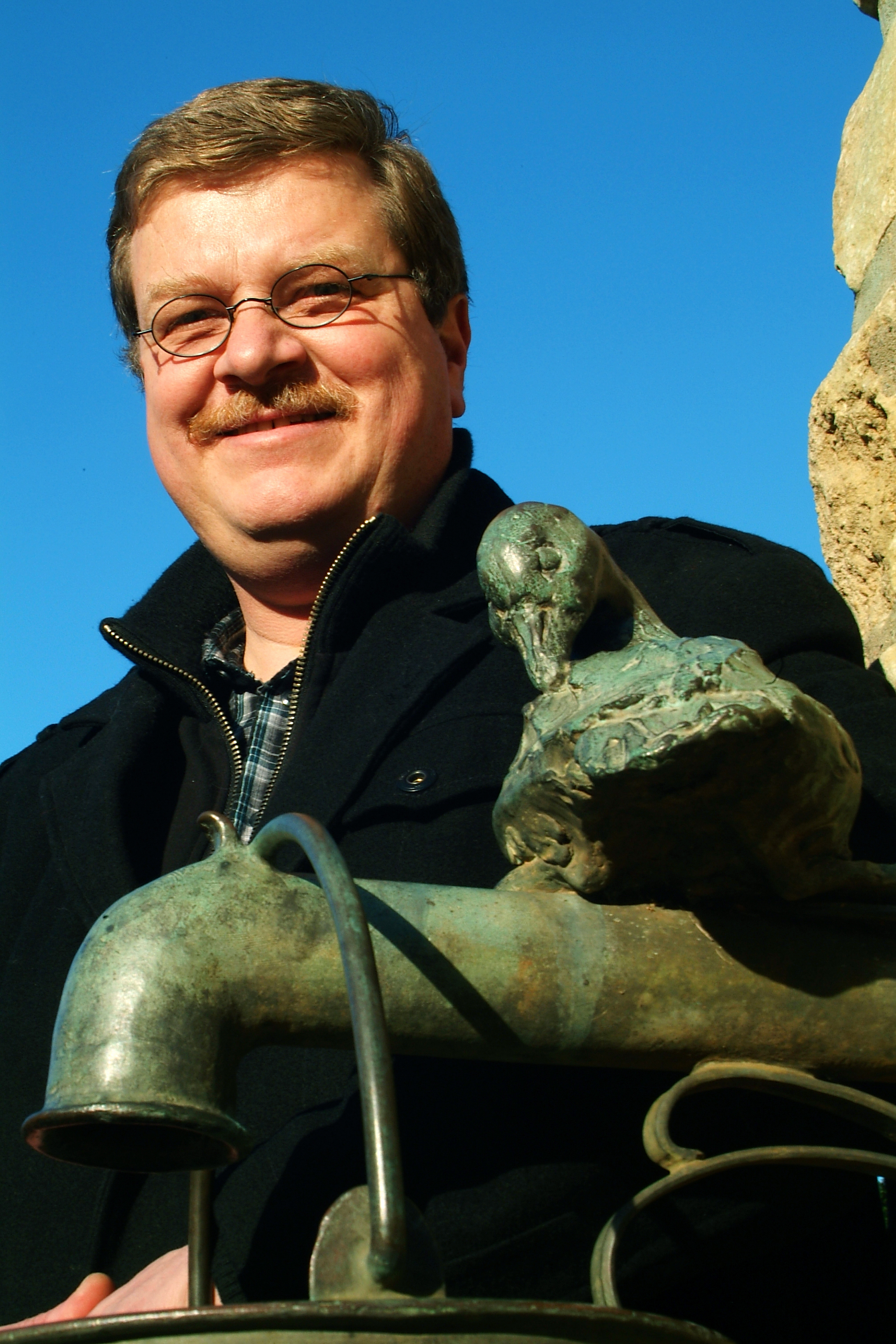 Der Gründer des Pinkenburger Kreises, einer Gruppierung innerhalb des Heimatbundes Niedersachsen, am Dorfbrunnen in der Pinkenburger Straße (Dorfplatz) im Stadtteil Groß-Buchholz